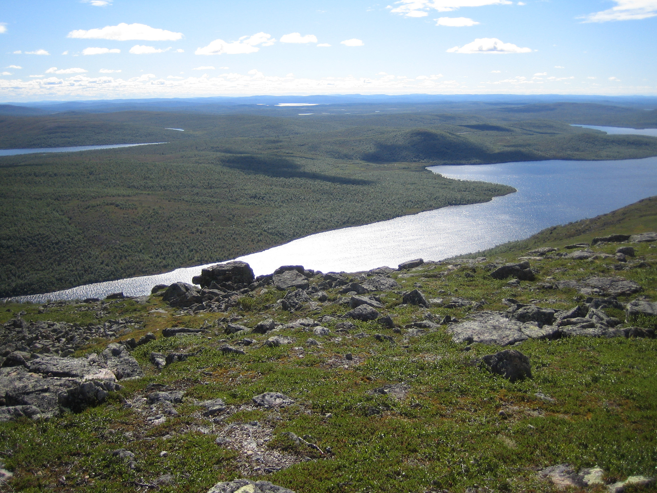 Peltojärvi in the Muotkatunturi Wilderness Area.